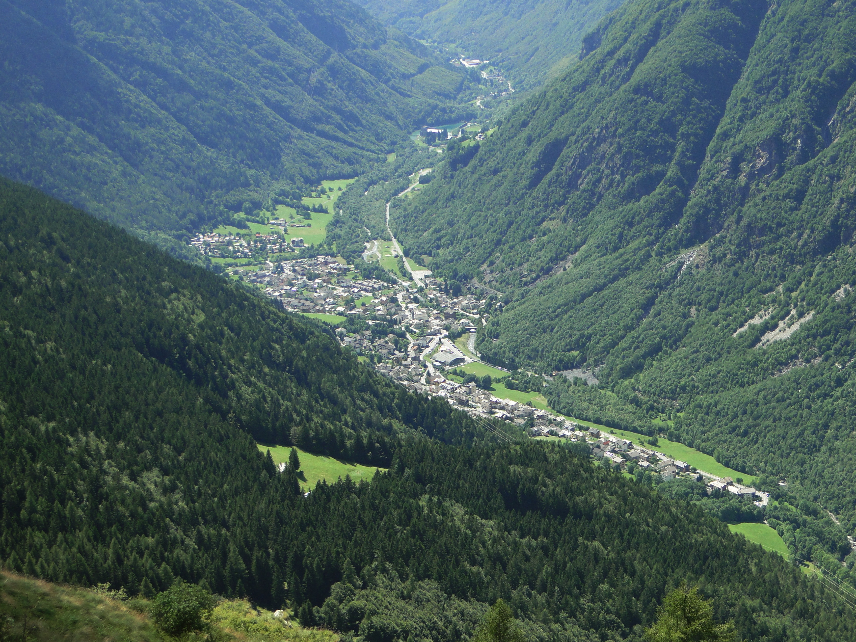 Vista su Valbondione, valle Seriana (BG), Italia